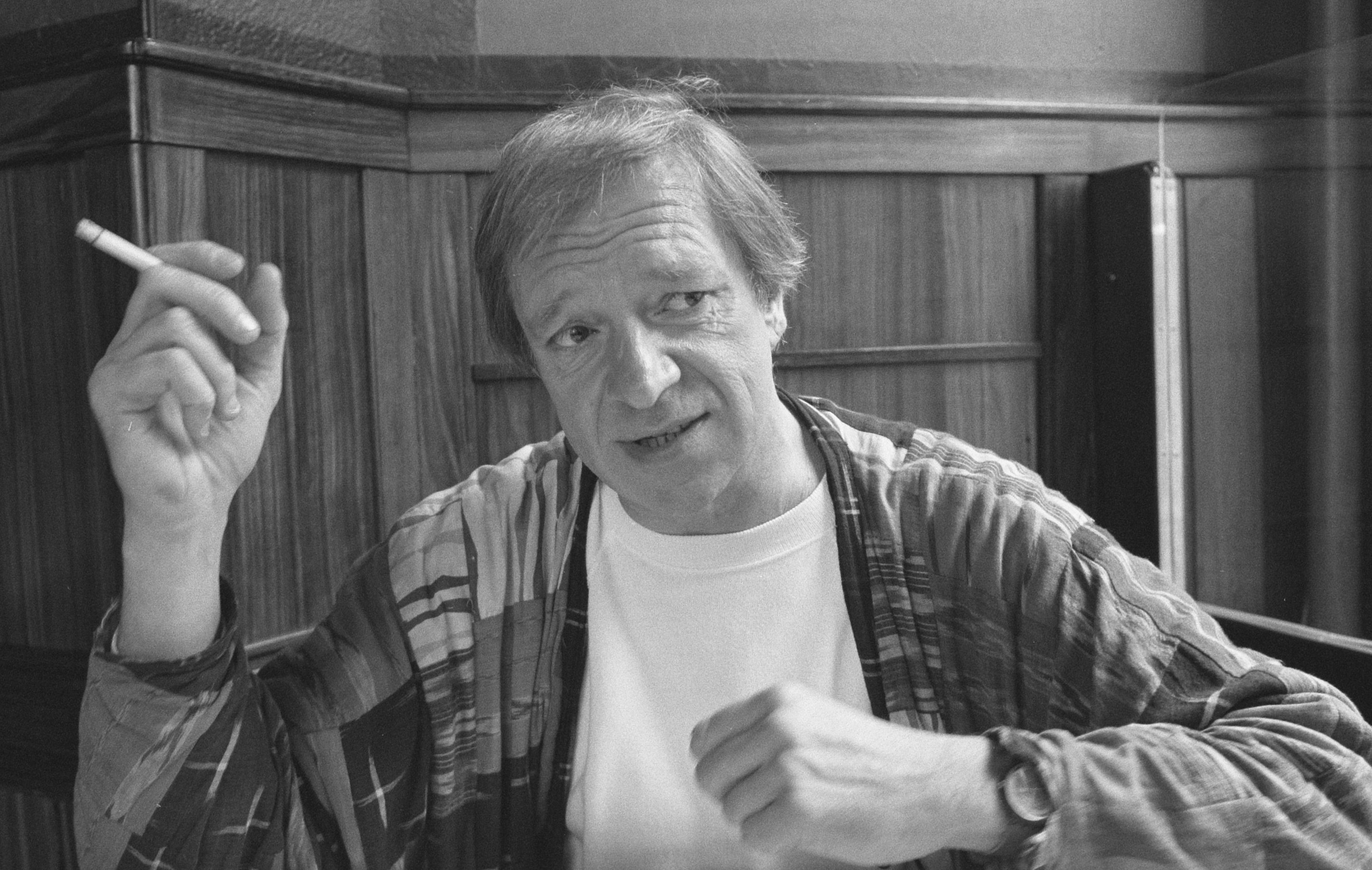 Collectie / Archief : Fotocollectie Anefo Reportage / Serie : [ onbekend ] Beschrijving : Ramses Shaffy Datum : 4 mei 1988 Trefwoorden : acteurs, portretten, zangers Persoonsnaam : Shaffy, Ramses Fotograaf : Croes, Rob C. / Anefo Auteursrechthebbende : Nationaal Archief Materiaalsoort : Negatief (zwart/wit) Nummer archiefinventaris : bekijk toegang 2.24.01.05 Bestanddeelnummer : 934-2428